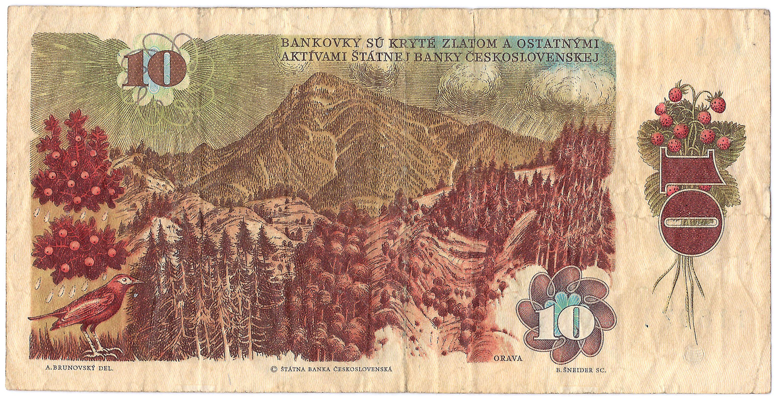 Reverz 10 korúnovej česko-slovenskej bankovky